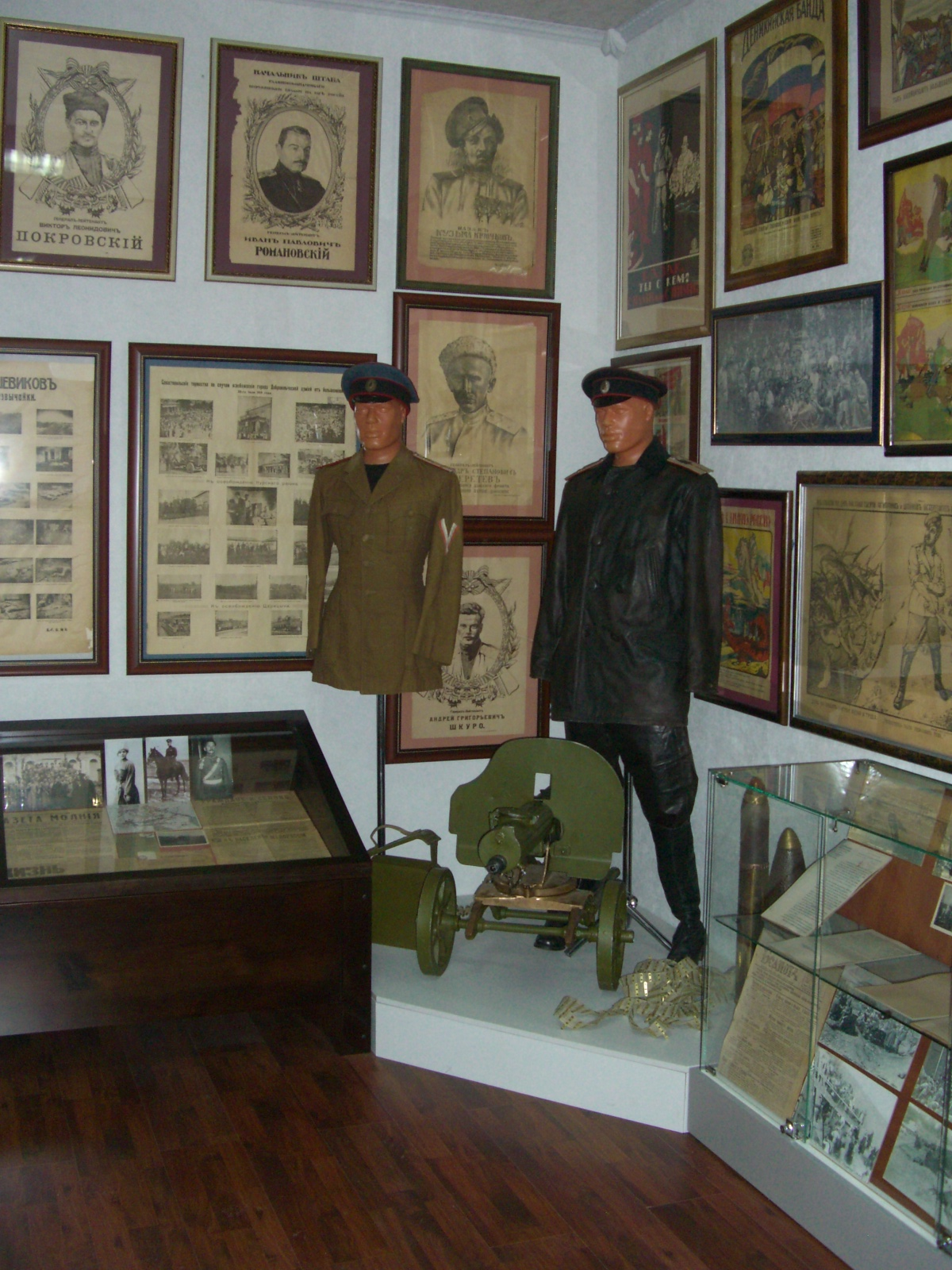 Зал белого движения в Музее антибольшевистского сопротивления